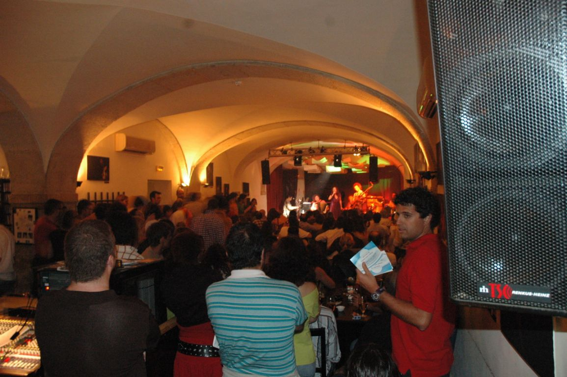 un concert a ondajazz